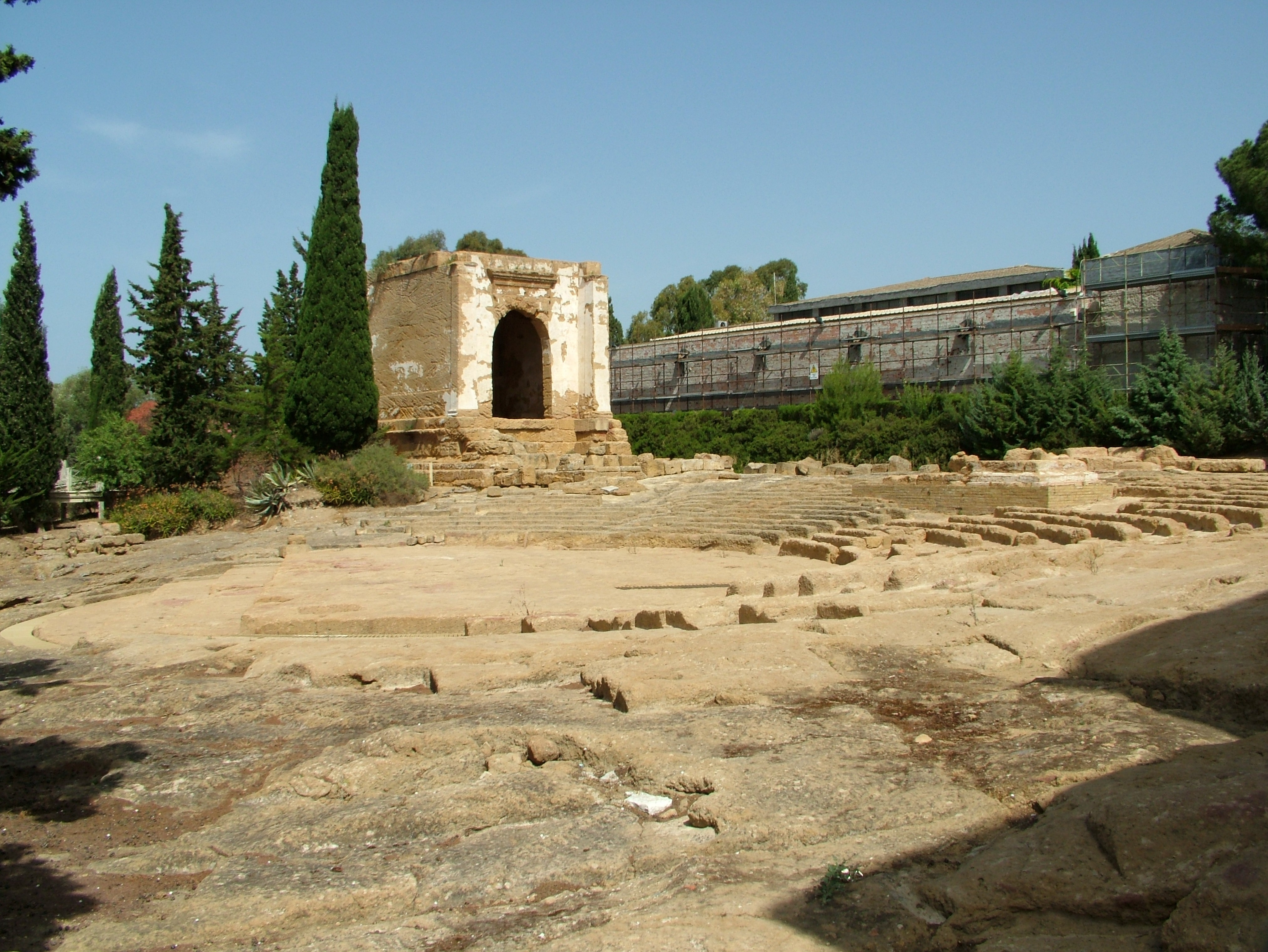 Agrigent, Sizlien, das Ekklasiasterion am Archäologischen Museum und das sogenannte Oratorium des Phalaris